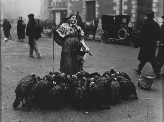 Venta de pavos para nochebuena en Madrid, España en 1925